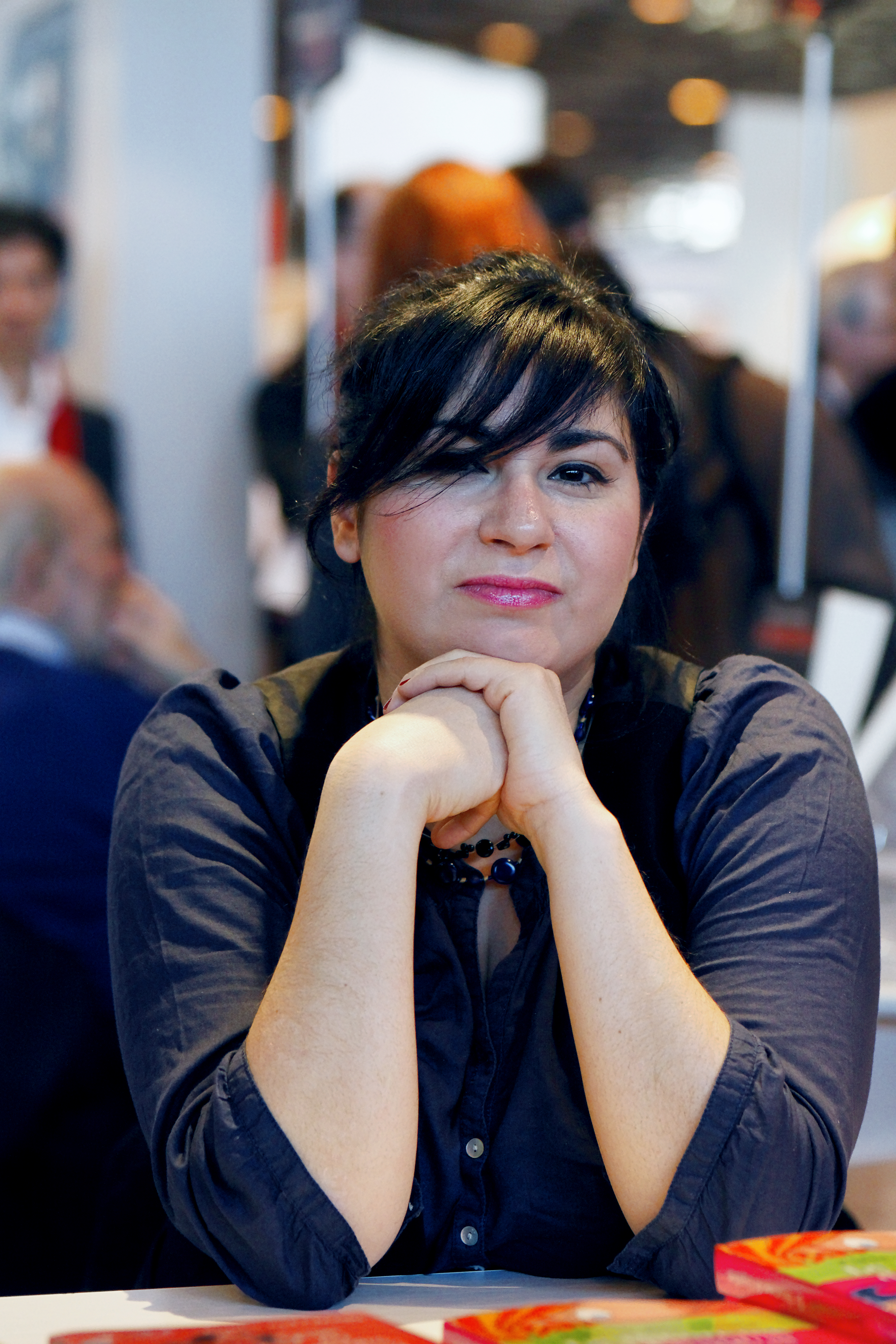 Cliché réalisé lors du salon du livre de Paris 2011.